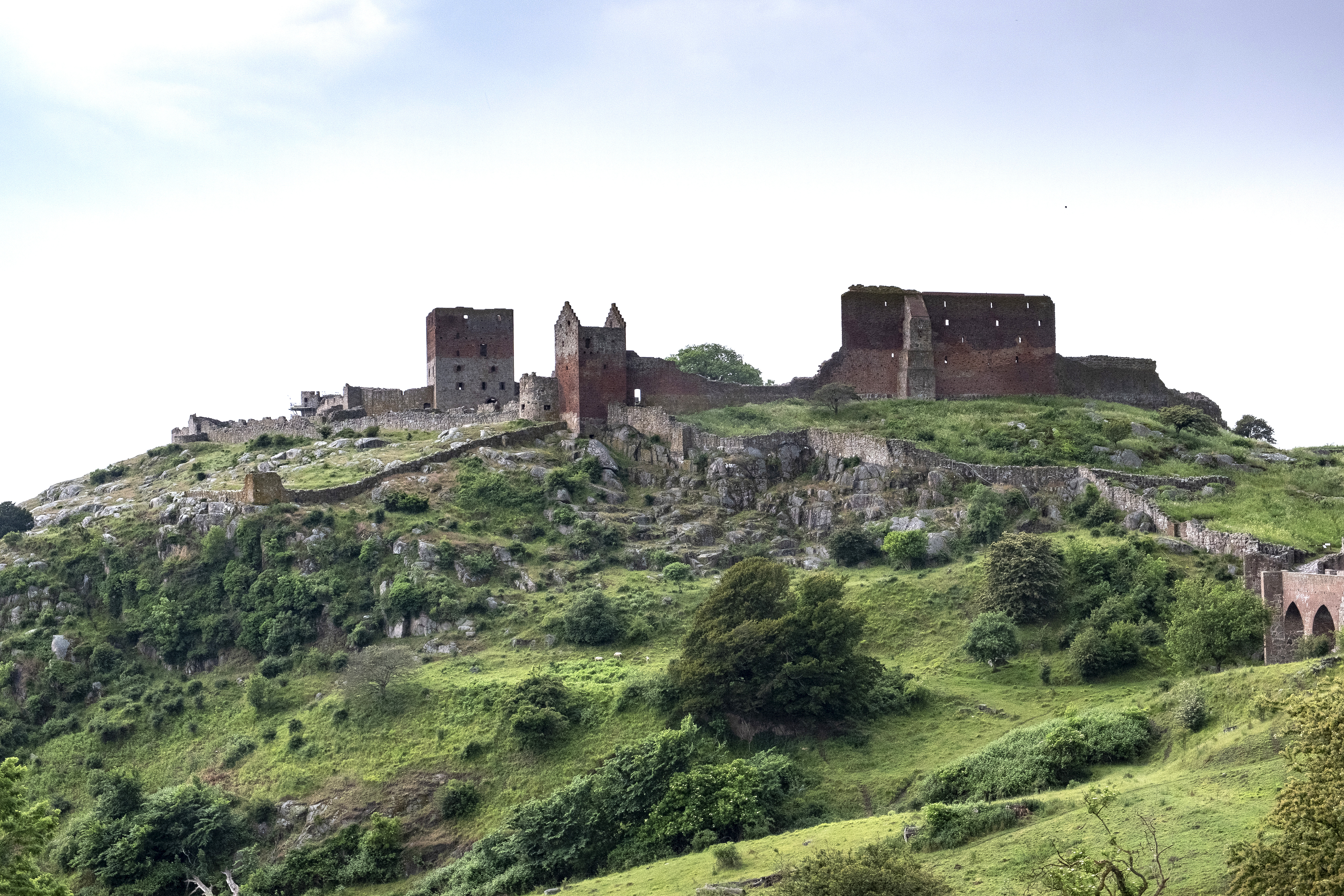 20190613. Bornholm. Slottsruinen Hammershus Photo: News Øresund - Johan Wessman © News Øresund - Johan Wessman (CC BY 3.0). Detta verk av News Øresund är licensierat under en Creative Commons Erkännande 3.0 Unported-licens (CC BY 3.0). Bilden får fritt publiceras under förutsättning att källa anges. .The picture can be used freely under the prerequisite that the source is given. News Øresund, Malmö, Sweden News Øresund är en oberoende regional nyhetsbyrå som är en del av det oberoende dansk-svenska kunskapscentrat Øresundsinstituttet.. .